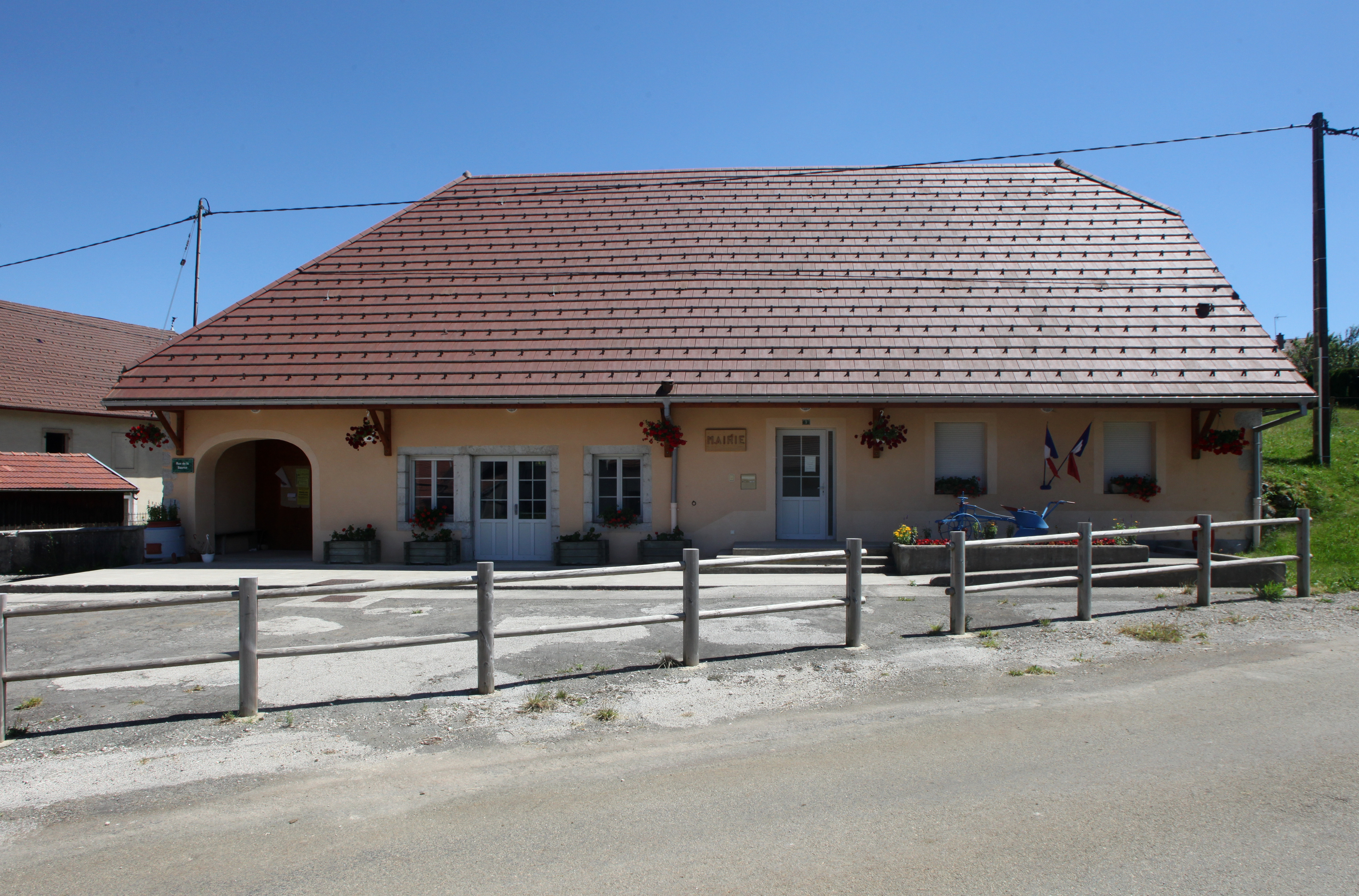 Mairie de La Latette (Jura).